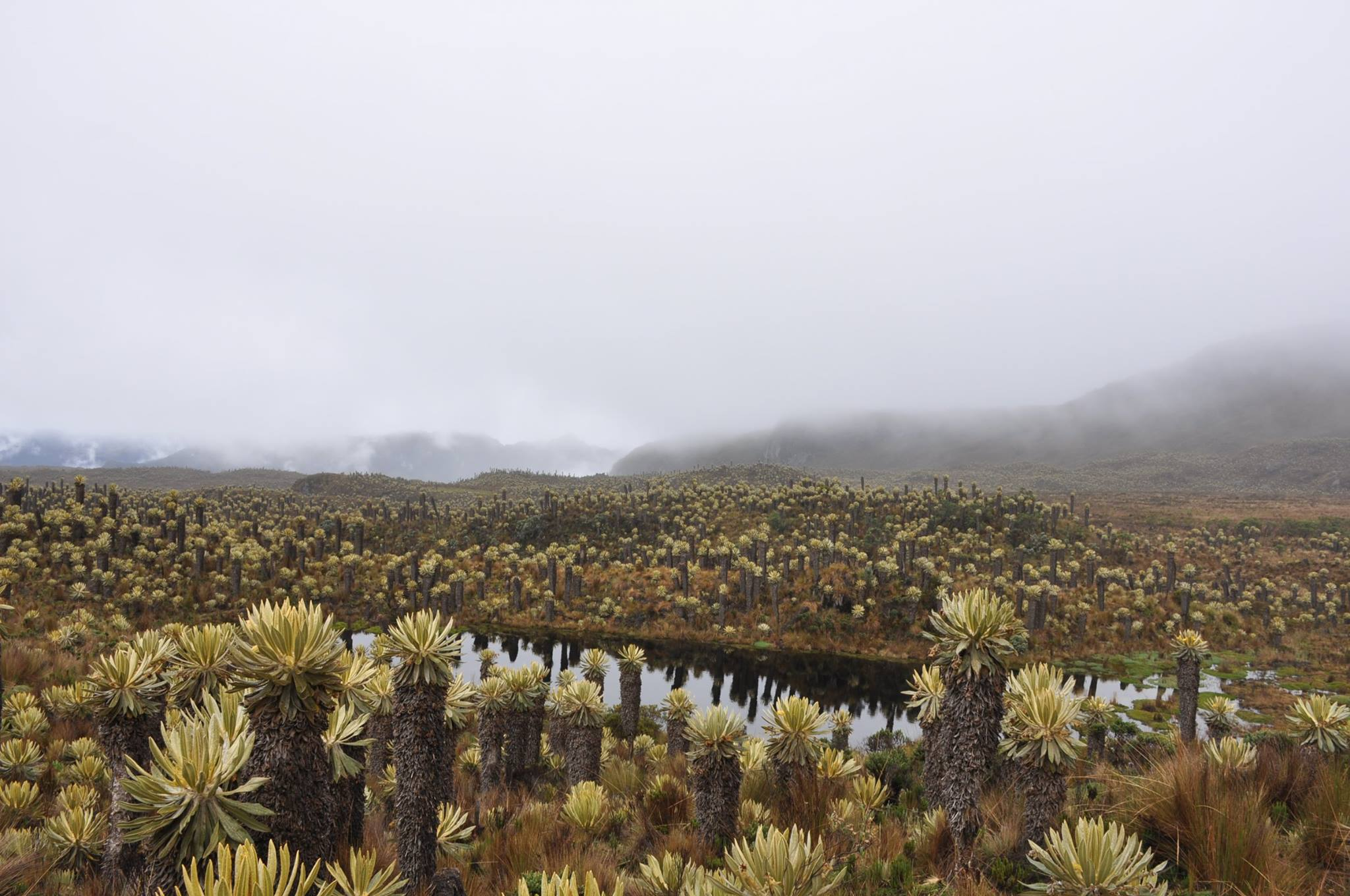 ¿Solo? ¿acaso se puede estar solo? Esta fotografía fue tomada en el municipio colombiano con código 73461.